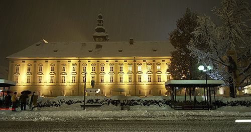 Landhaus Klagenfurt, Südseite - southern wing 13:28, 8. Jan 2006 Eixi 500 x 264 (104279 Byte) (* Bildbeschreibung: Landhaus Klagenfurt, Südseite * upload by ~~~~ with the permission of the photographer * Fotograf: Helge Bauer, )